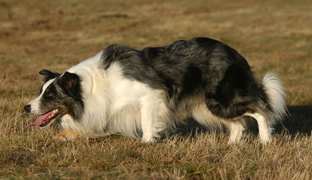 Border Collie (Roy) en plein travail